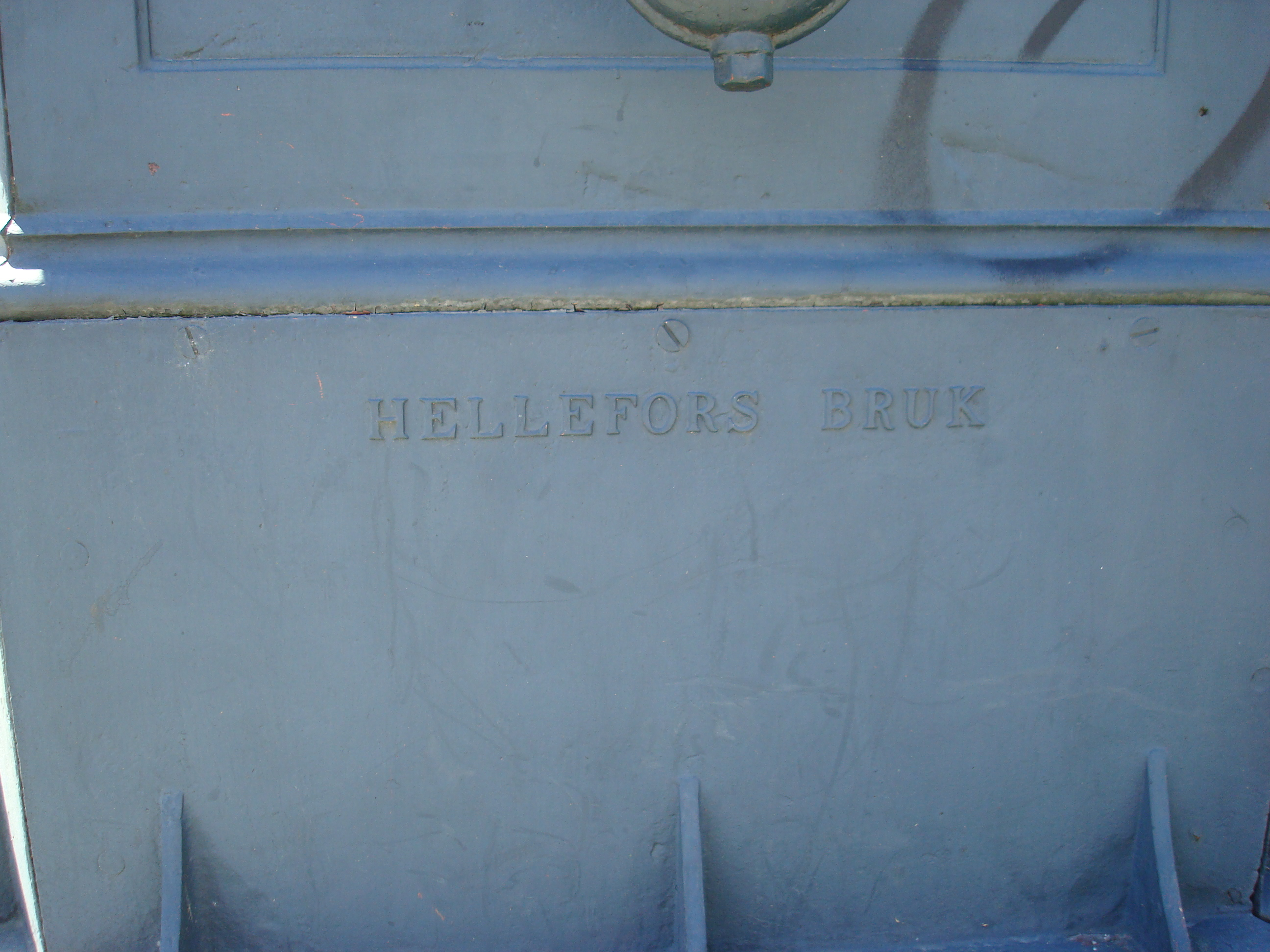 Hälleforsnäs bruks stämpel på S:t Eriks källa